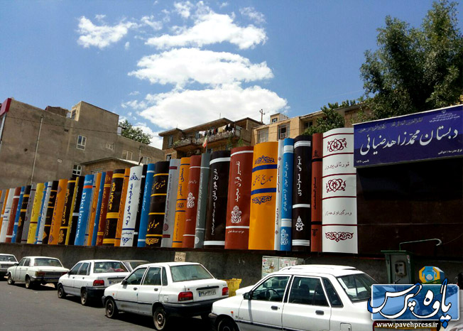 دیوار کتاب بر روی دبستان علامه ضیائی پاوه - تاسیس 1340 - پاوه